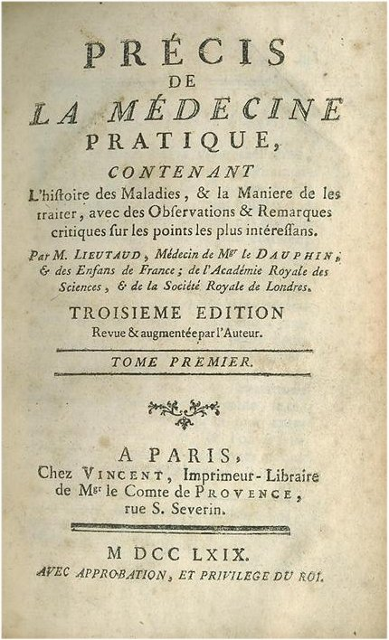 précis medecine pratique